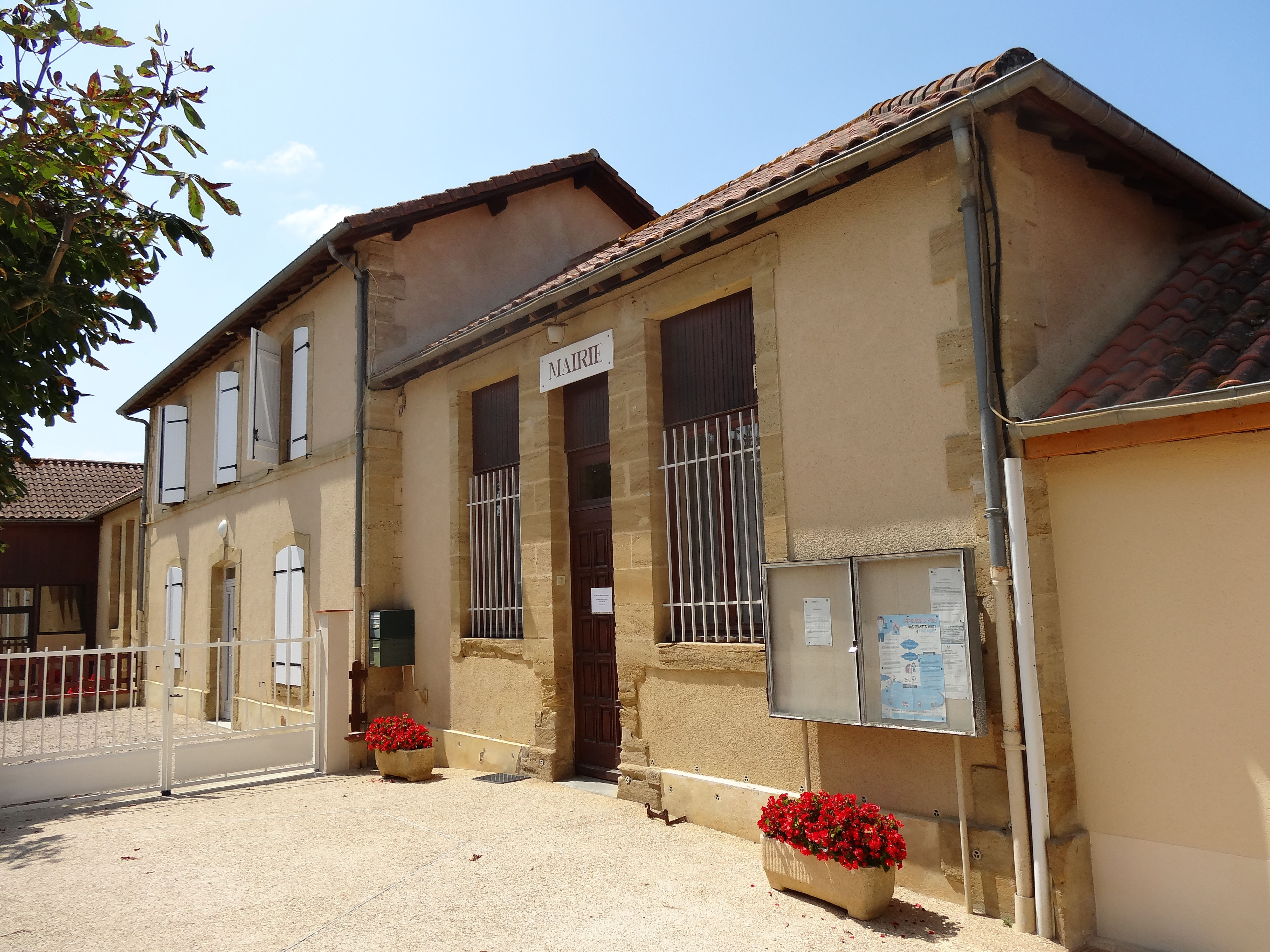 Mairie de Laveraët.